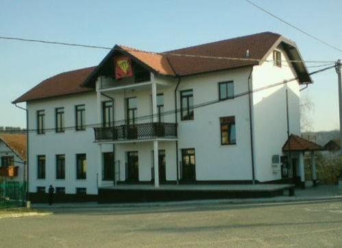 Tarevci Dom Kulture